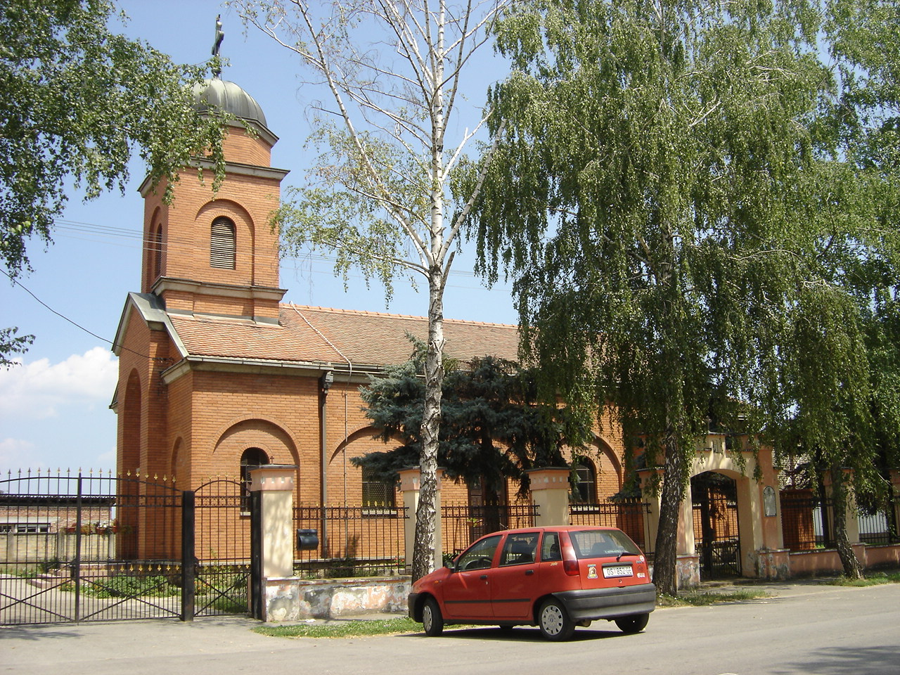 Crkva svetog oca Nikolaja u Tenji